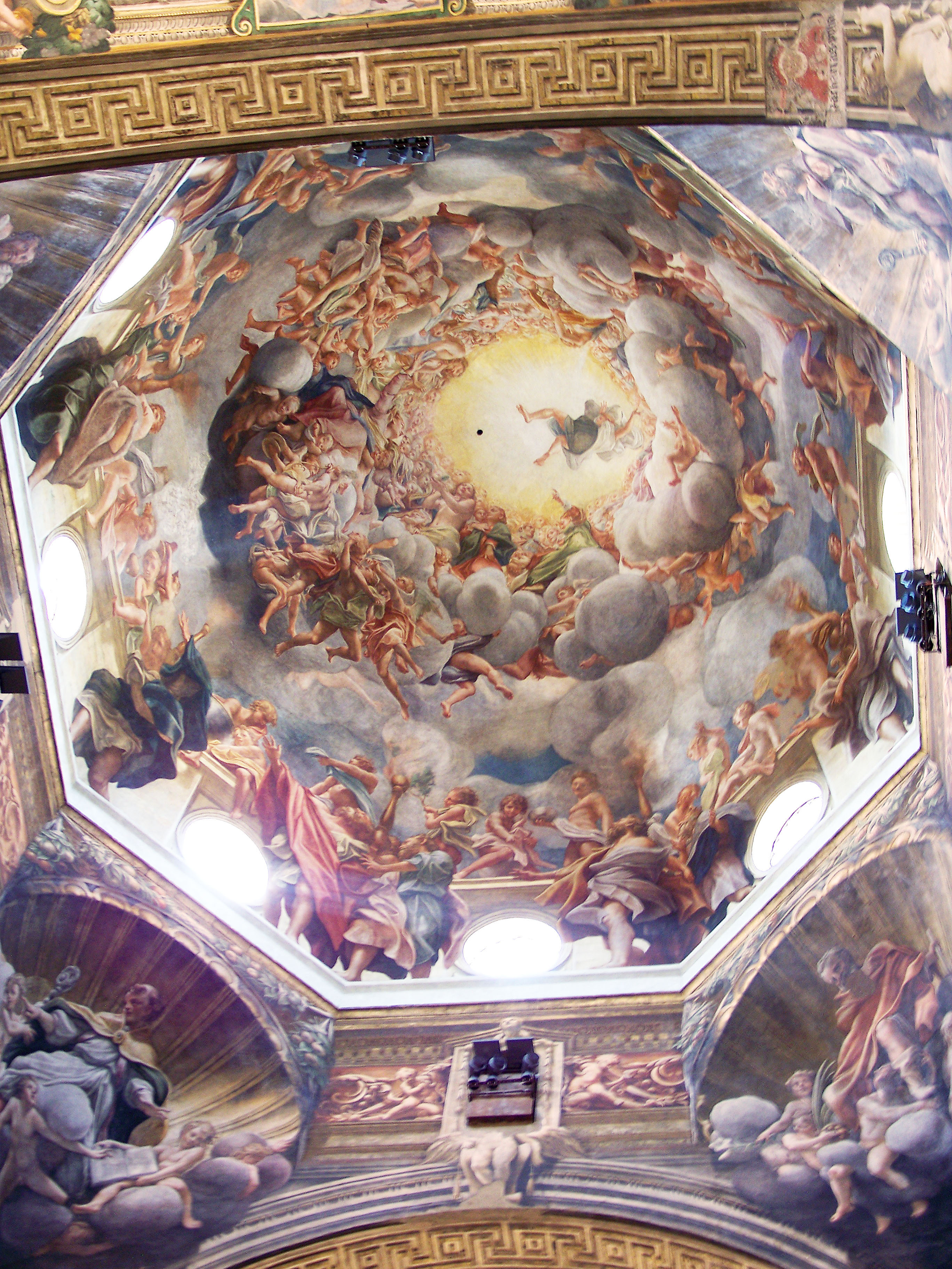 Cupola del Duomo di Parma, affresco con la "Assunzione della Vergine", opera di Antonio da Correggio